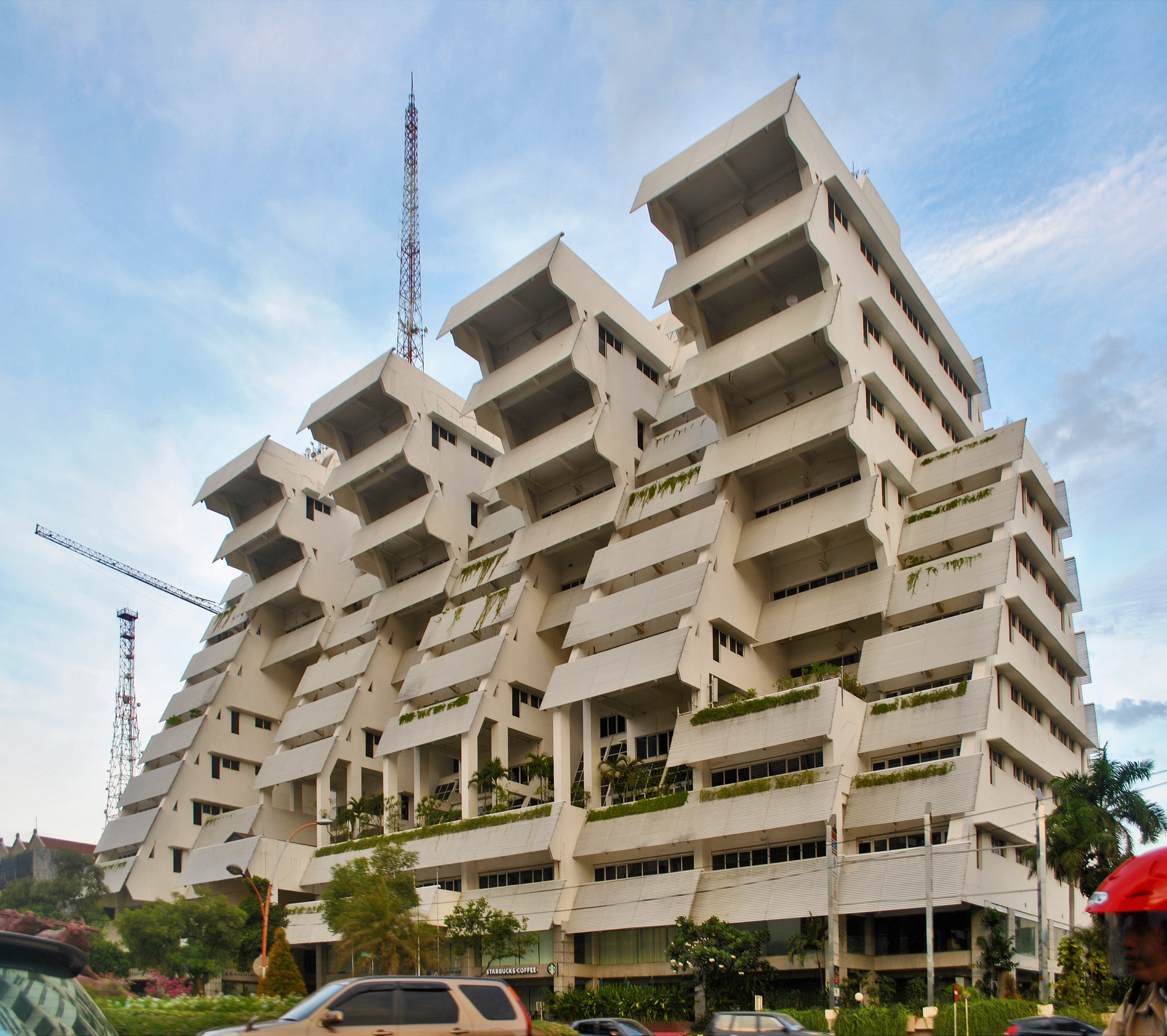 Another Paul Rudolph's Indonesian gem. 14 storey, 50 metres, completed just at same year of Paul's death. Salah satu karya Paul Rudolph lainnya di Indonesia. 14 lantai, 50 meter, dan baru selesai dibangun pada 1997 - sebelum Paul wafat akibat kanker perut. Sumber: 1 , 2 sumber banyak.